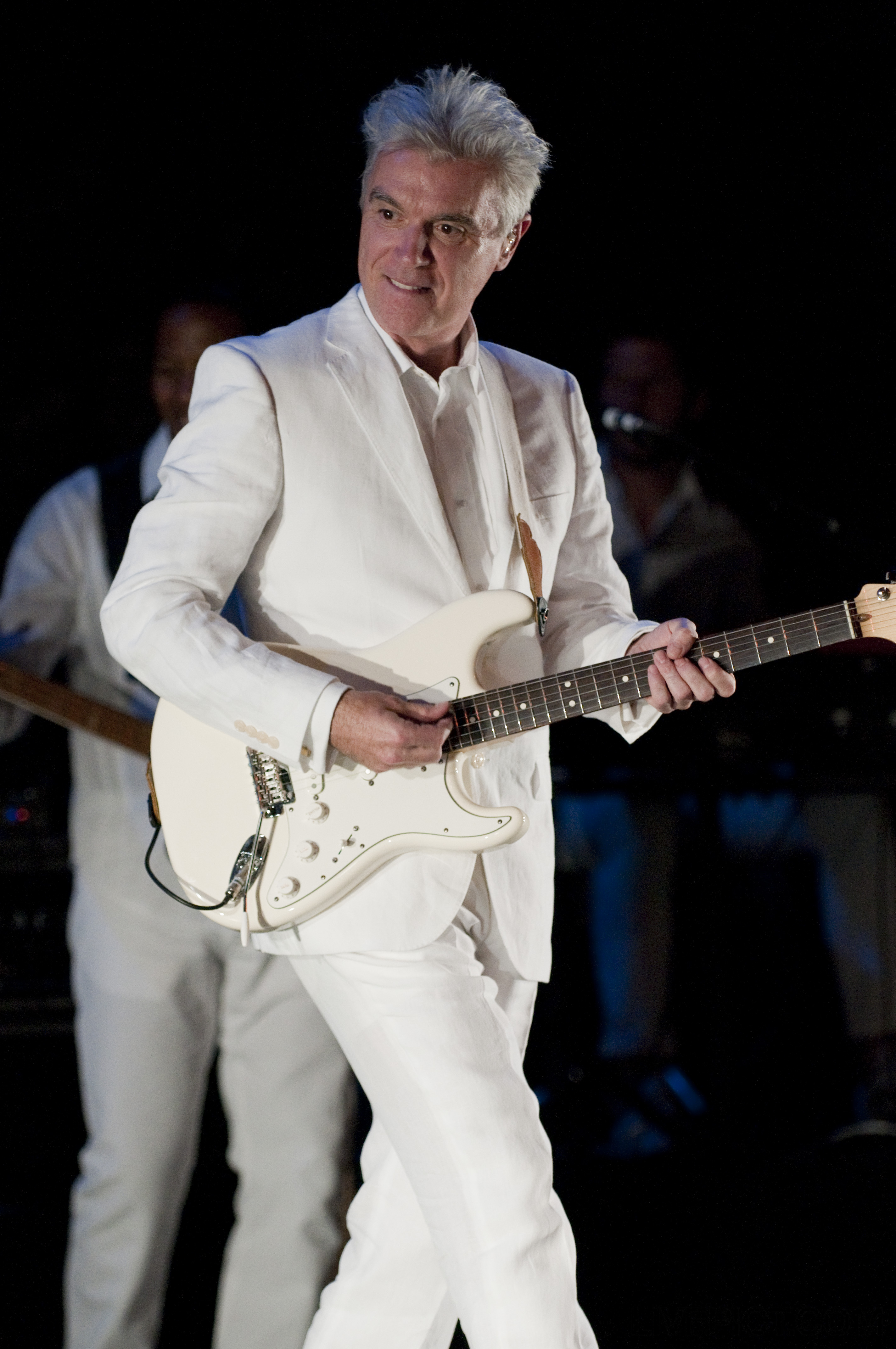 David Byrne